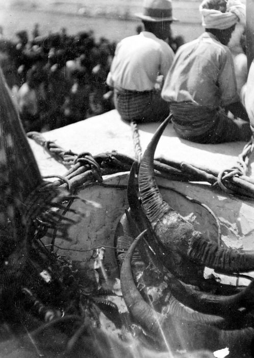 Repronegatief. Tijdens het slepen van een grafsteen wordt even uitgerust; op de steen zijn horens van de geofferde karbouwen gebonden, West-Sumba